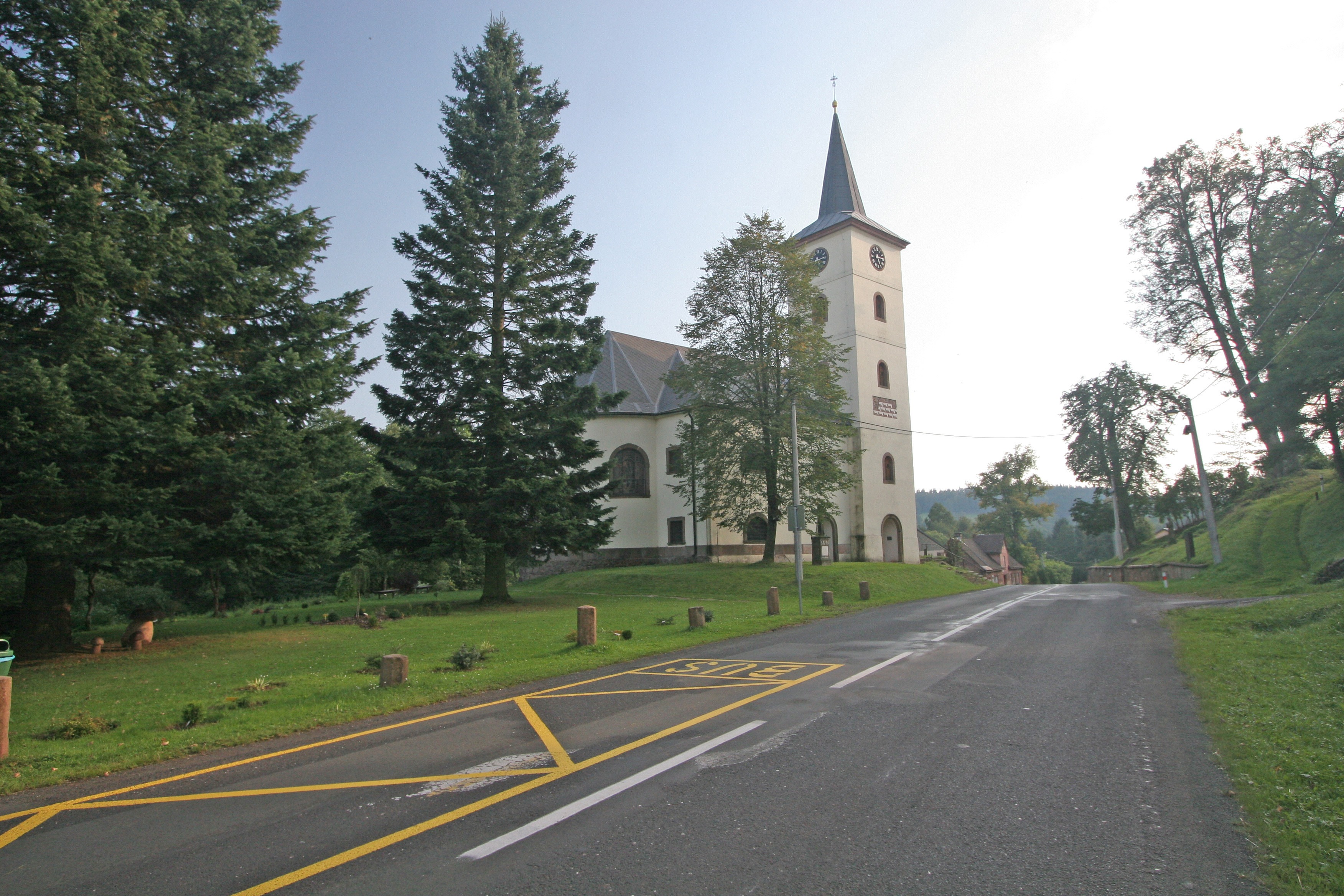 Kostel svaté Kateřiny, Zlatá Olešnice, Zlatá Olešnice (okres Trutnov).